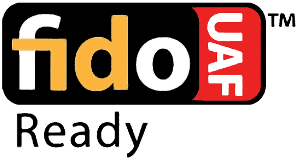 Logo von